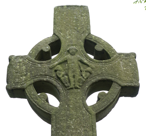 Monasterboice, North Cross, head, west side